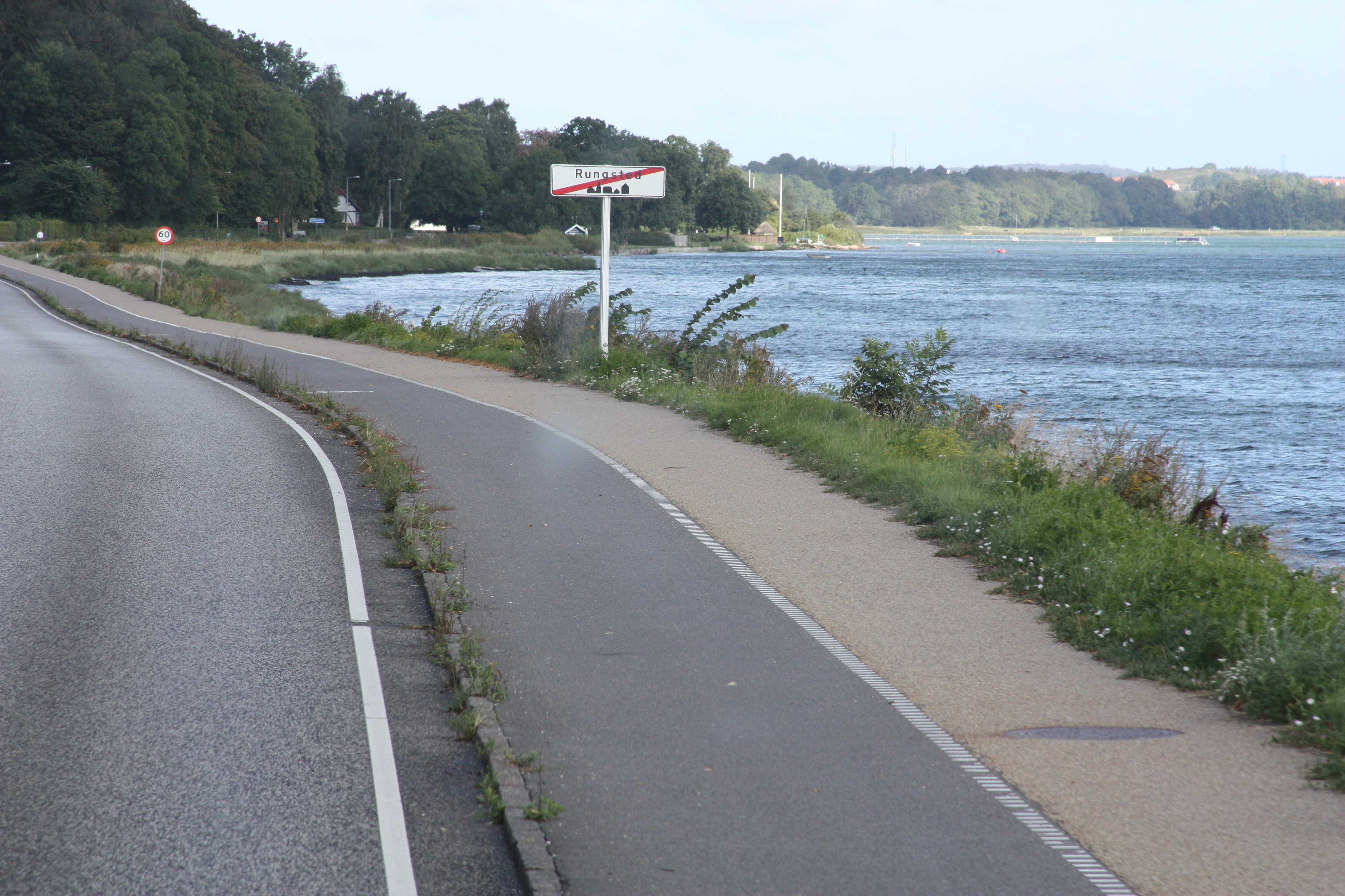 August 2009